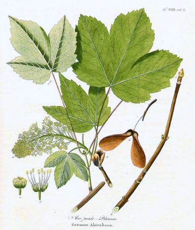 Amsterdam, Johannes Allart, 1802 [-1808]